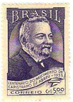 Selo postal brasileiro emitido em 1953 em homenagem aos 100 anos do nascimento do escritor Capistrano de Abreu.